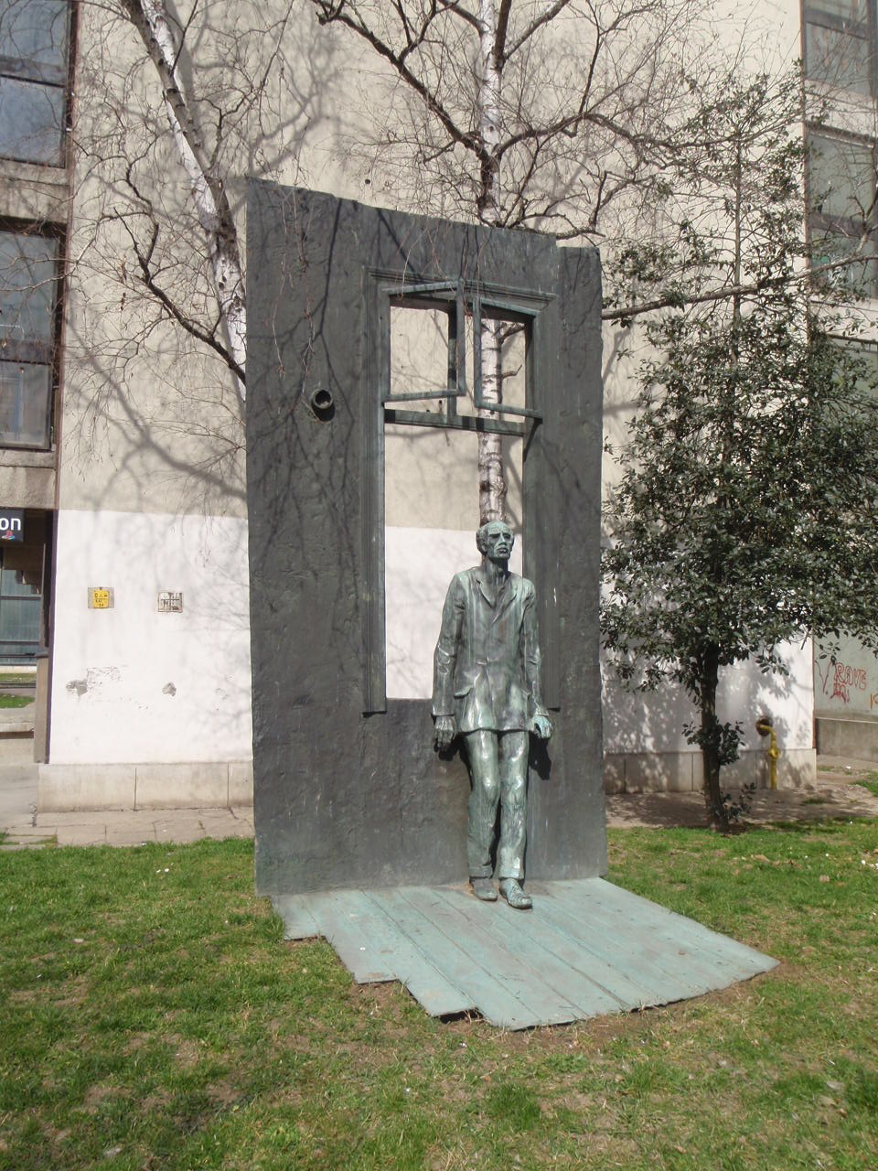 Derkovits Gyula szobor Szombathely, Varga Imre szobrászművész alkotása 1977-ből